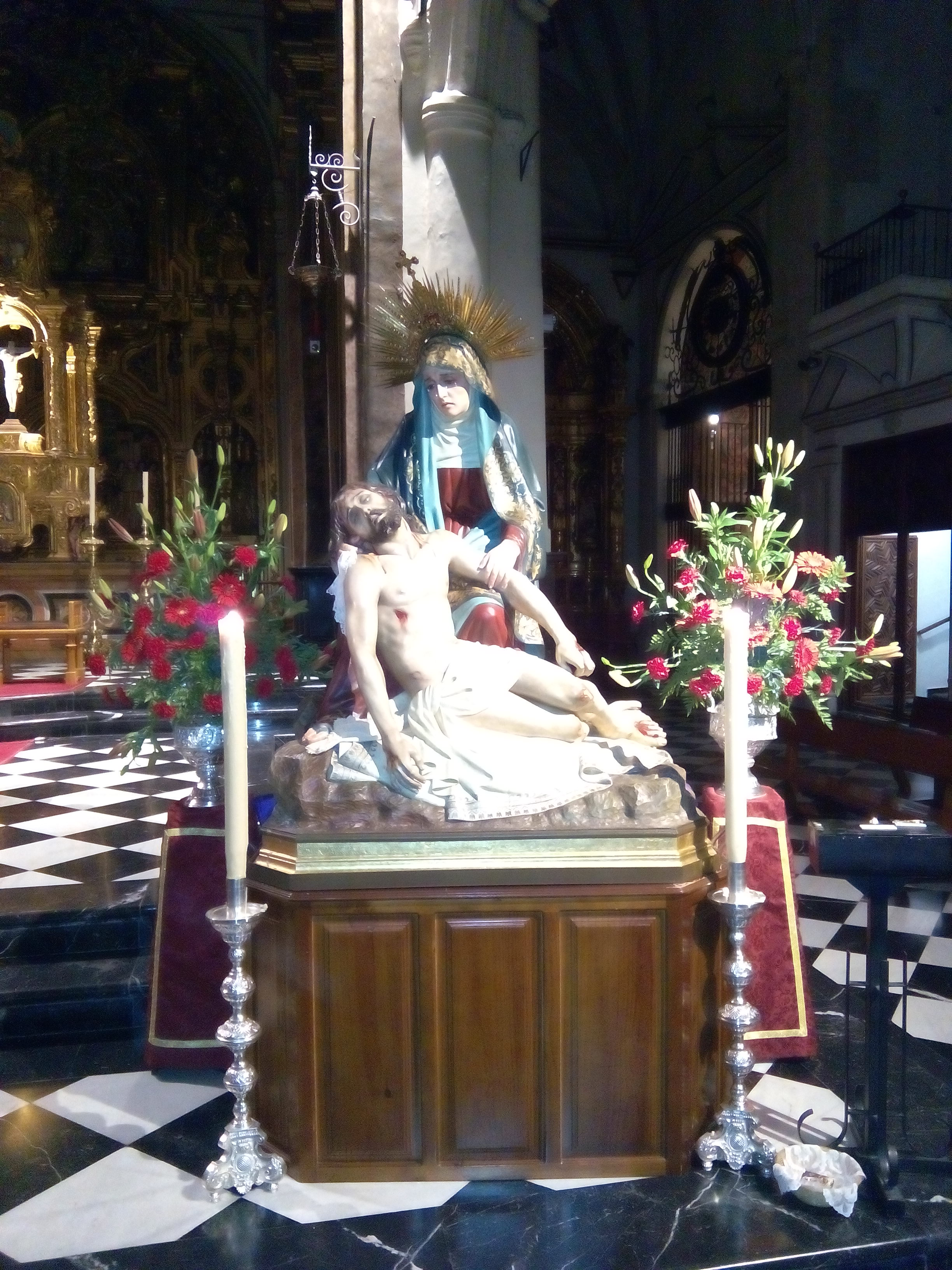 Vista del grupo escultórico de la Piedad de la Cofradía de la Soledad de Jaén en el Altar Mayor de la Basílica de San Ildefonso.